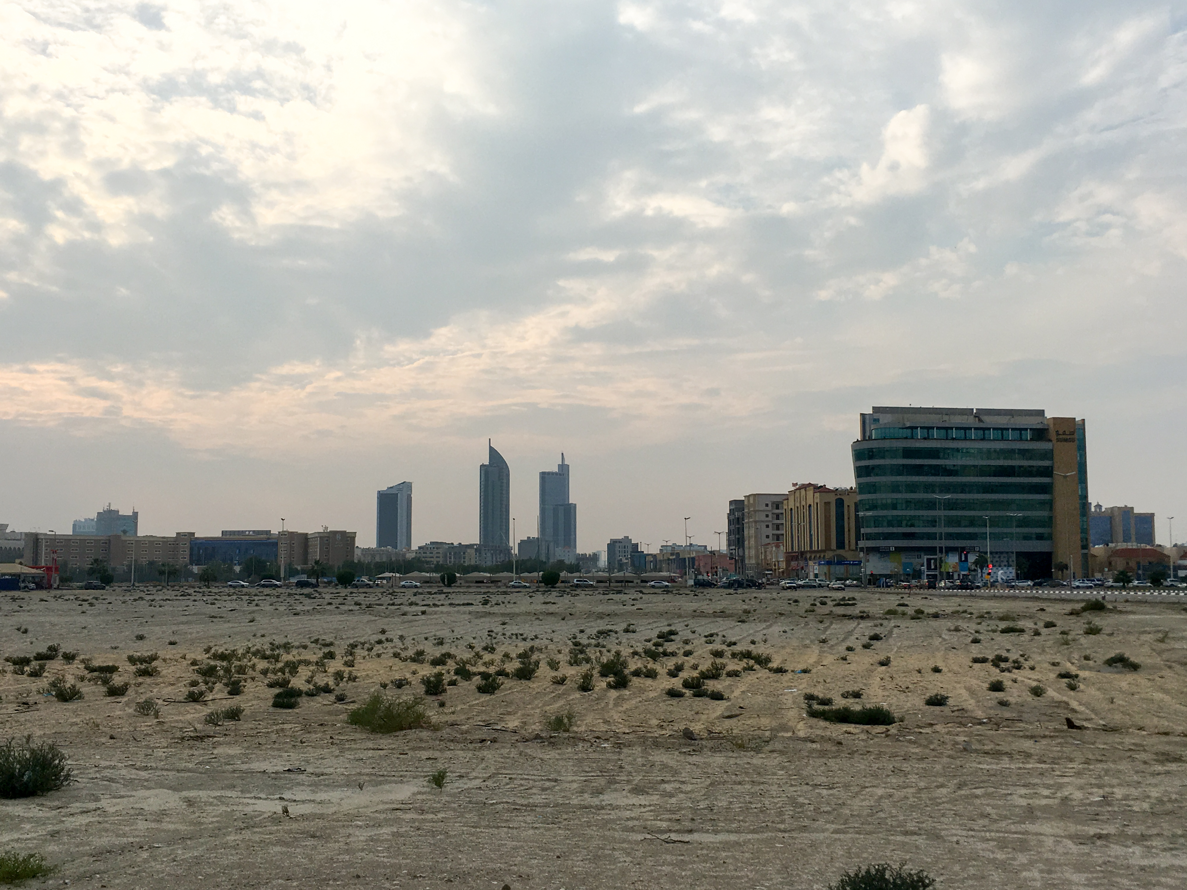 Al Khobar skyline